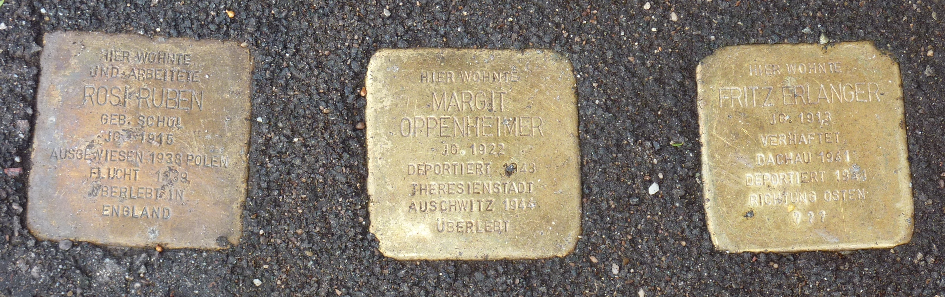 drei Stolpersteine beim Theodor-Rothschild-Haus in Esslingen